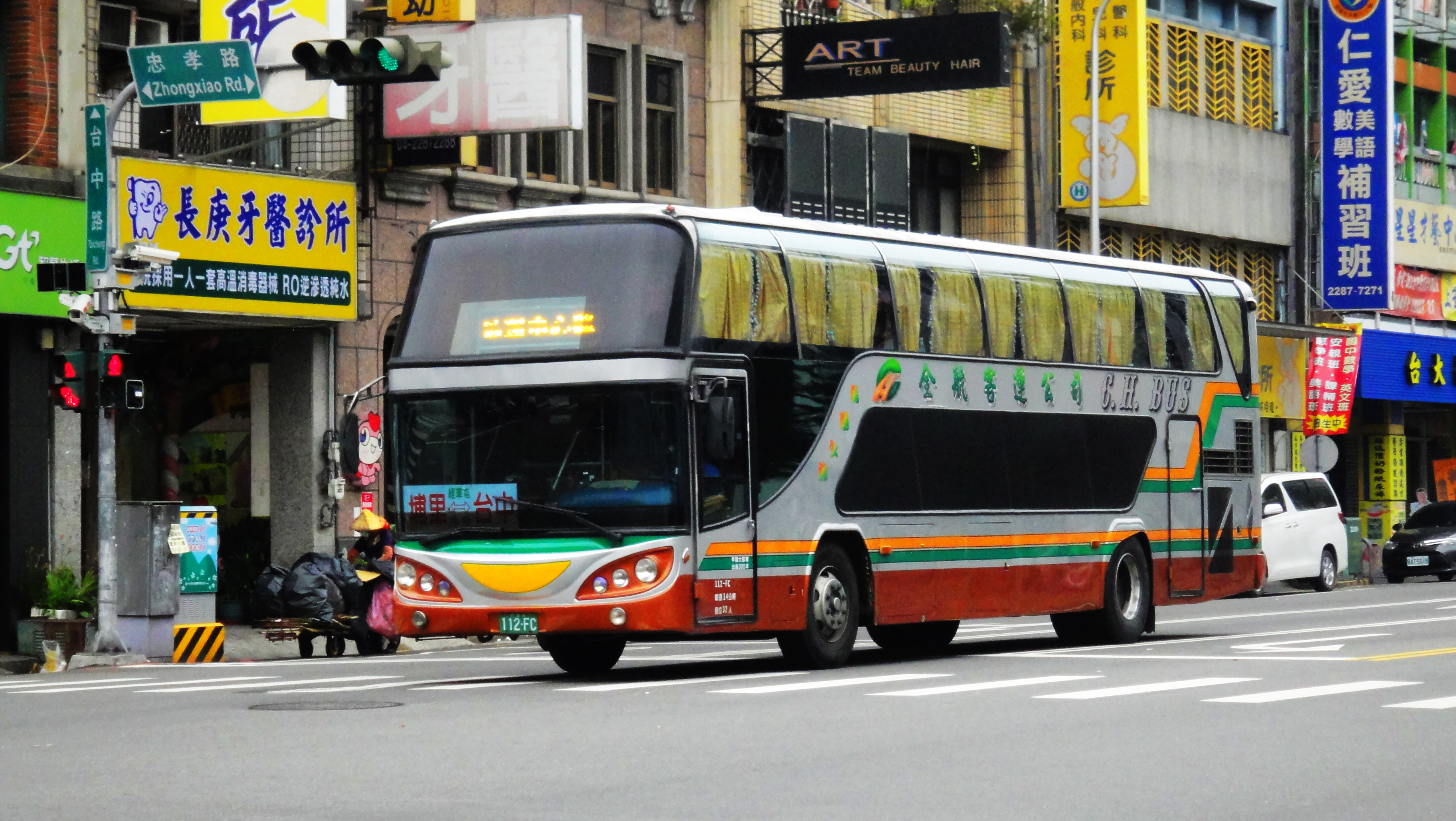 全航客運 112-FC 6268路